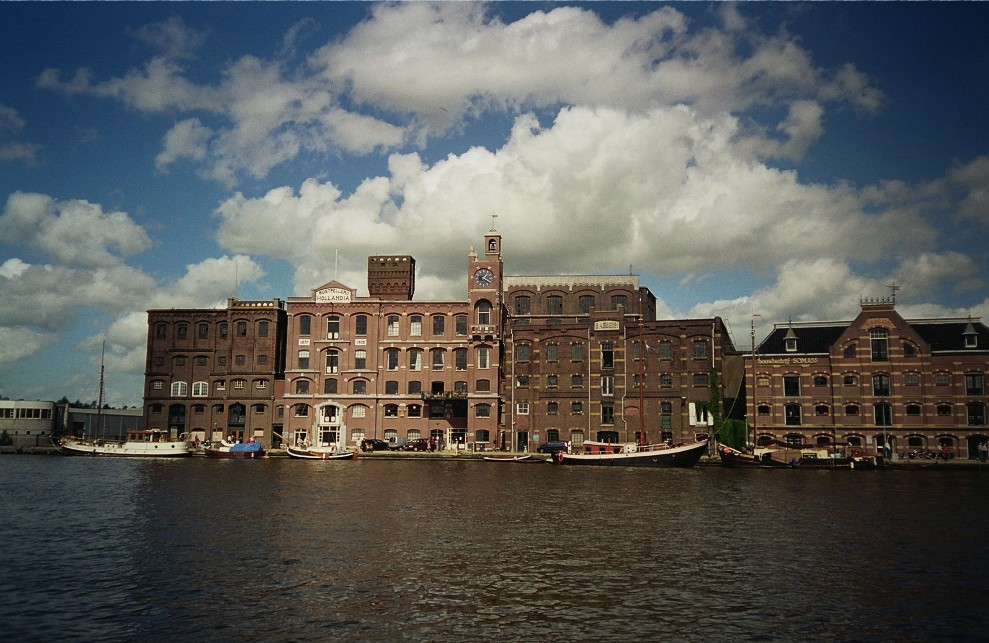 Foto van 19e-eeuwse pakhuizen langs de Veerdijk in Wormer. Op de voorgrond de rivier de Zaan. Foto gemaakt door uploader op 28 augustus 2004.